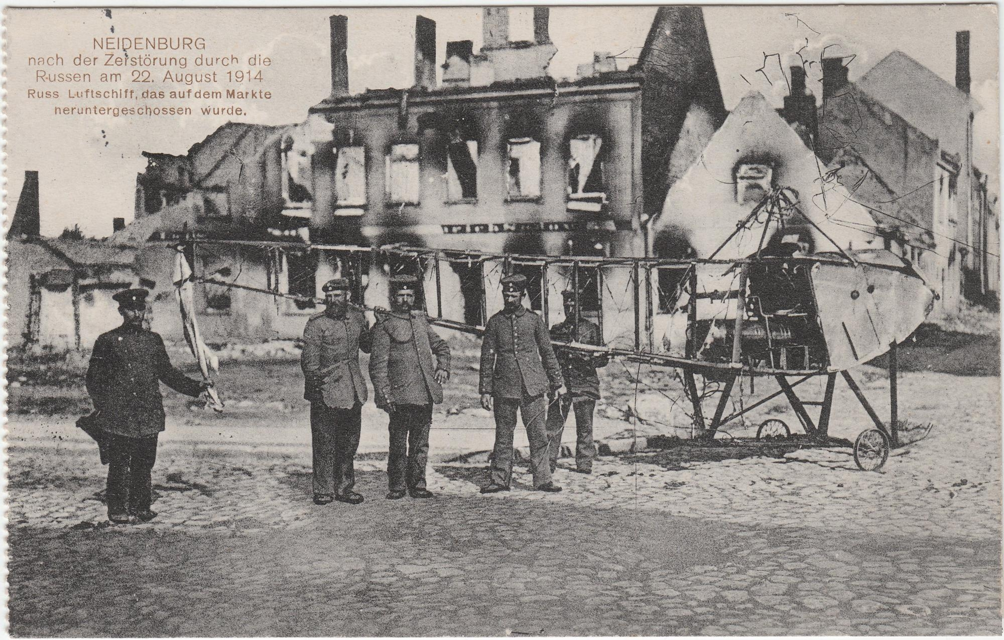 Ansichtskarte "NEIDENBURG nach der Zerstörung durch die Russen am 22. August 1914 Russ. Luftschiff, das auf dem Markte heruntergeschossen wurde"